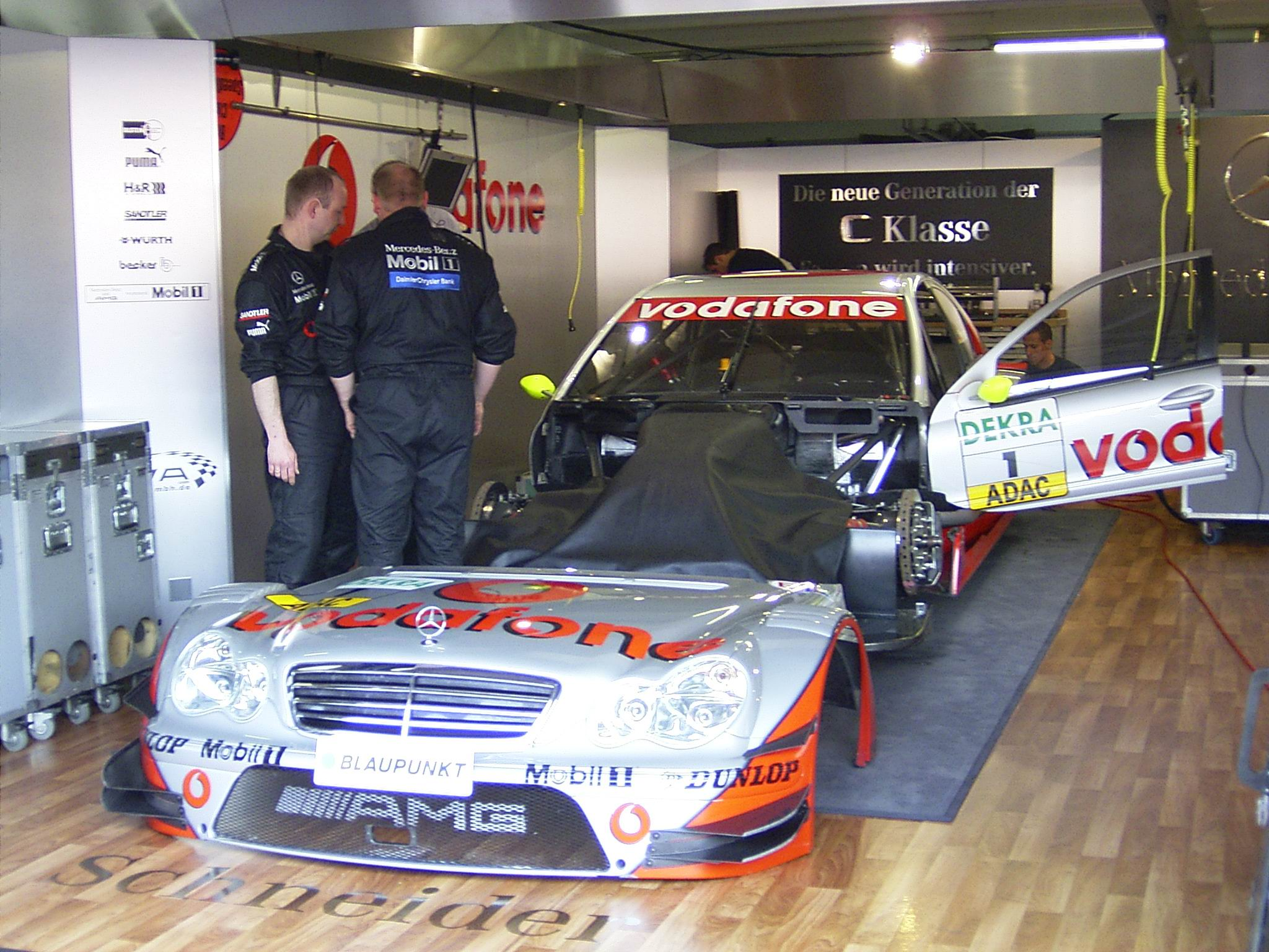 Bildbeschreibung: DTM-Box am Hockenheimring von Bernd Schneider während des Pitwalks, kurz vor dem Qualifying Quelle: selbst fotografiert Fotograf/Zeichner: Christian Bock Datum: 17.04.2004 14:58, 27. Okt 2005 BeOCeKa 2048 x 1536 (448461 Byte) (Beim DTM Rennen 2004 Hockenheimring I)